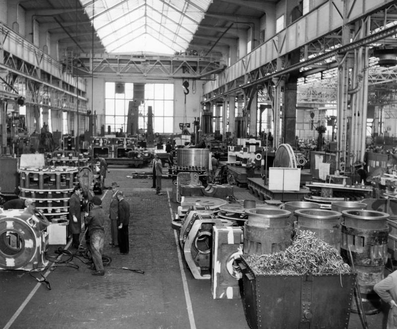 Blick in ein Hallenschiff der 22 240 qm großen Westhalle für schweren und mittleren Maschinenbau der Borsig Aktiengesellschaft, Berlin-Tegel